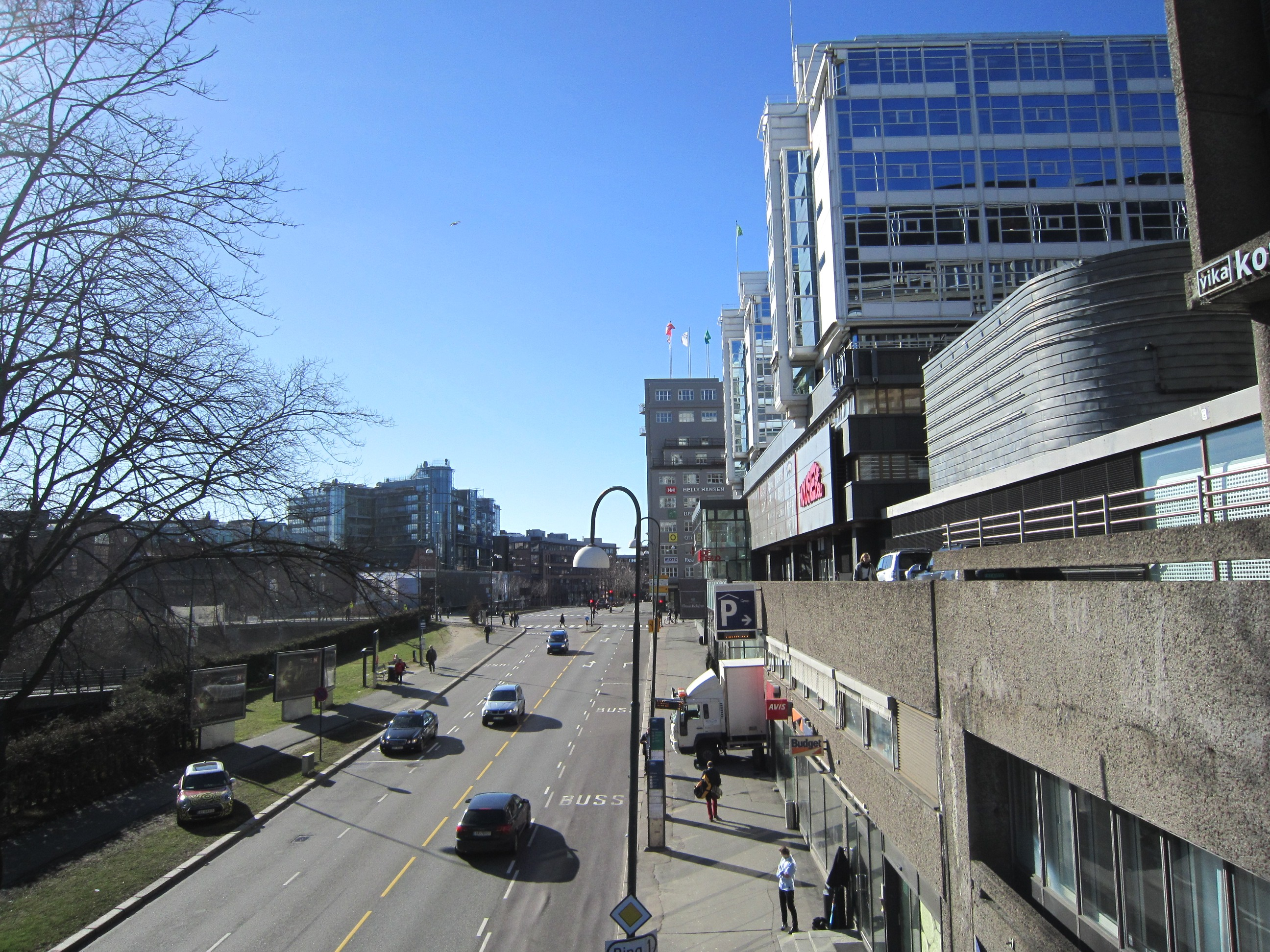 Munkedamsveien i Vika